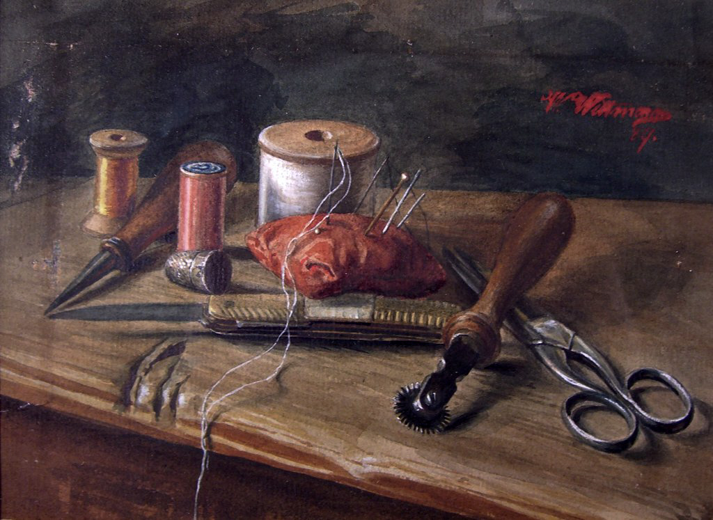 Stilleben mit Nähutensilien. Aquarell. 14 x 19 cm